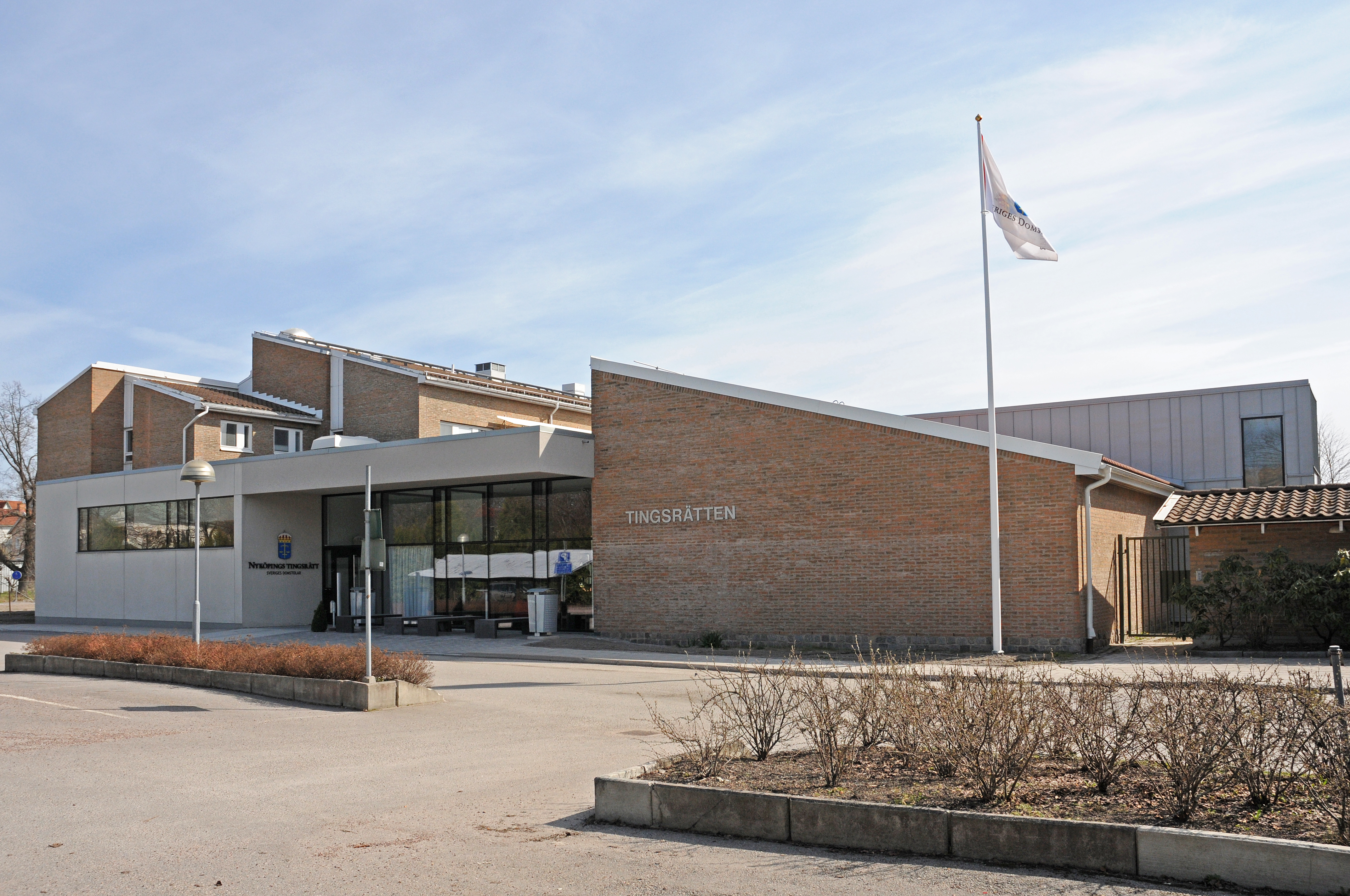 Tingsrätten i Nyköping